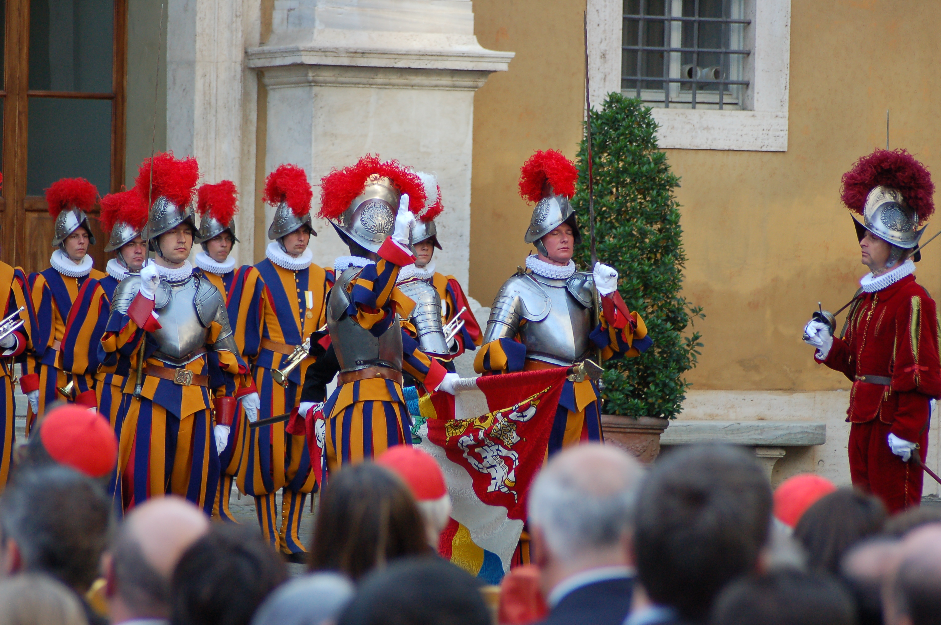 Vereidigung eines Schweizergardisten in Rüstung